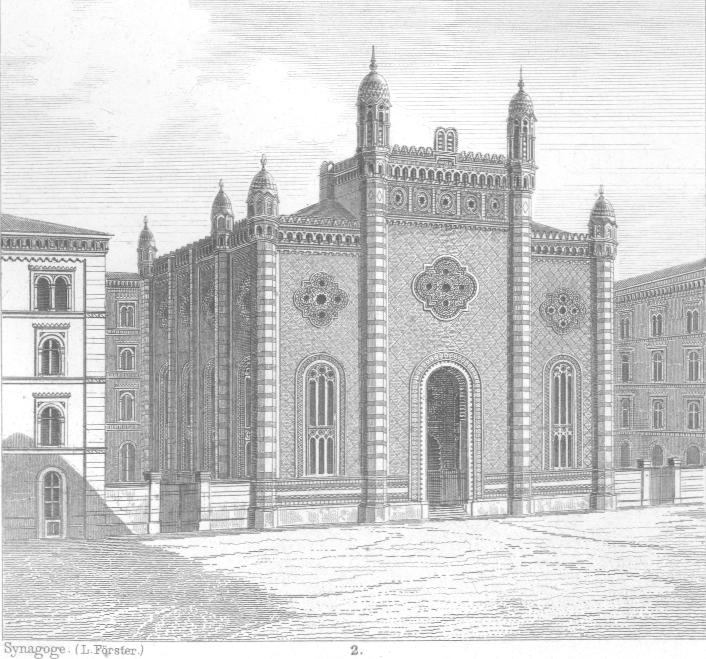 Synagoge Tempelgasse in Wien (1858-1938), Architekt: Ludwig Förster